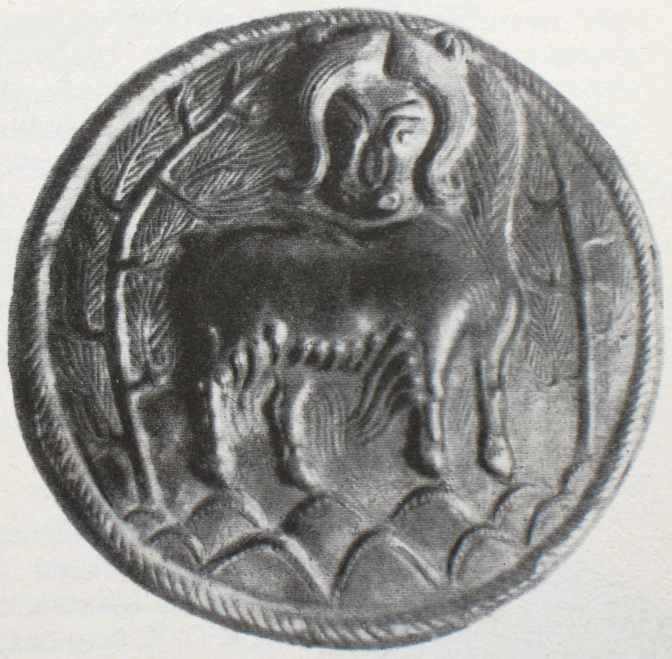 Photo in Mongolia, Noin-Ul. 1924 Ноин-Ульская находка в кургане (до войны точно находилась в Эрмитаже, Ленинград). Гуннская культура. Раскопки археологов СССР в Ноин-Уле, сезон 1924 года, 100 км на север от Улан-Батора (Урги). Журнал "Вокруг света", СССР.